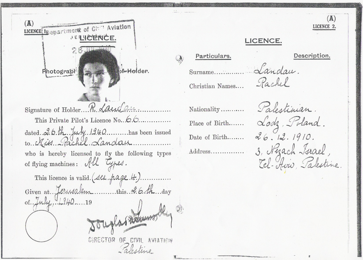 רשיון מנדטורי מס' 66 של רחל (לנדאו) מרקובסקי, 26.7.1940